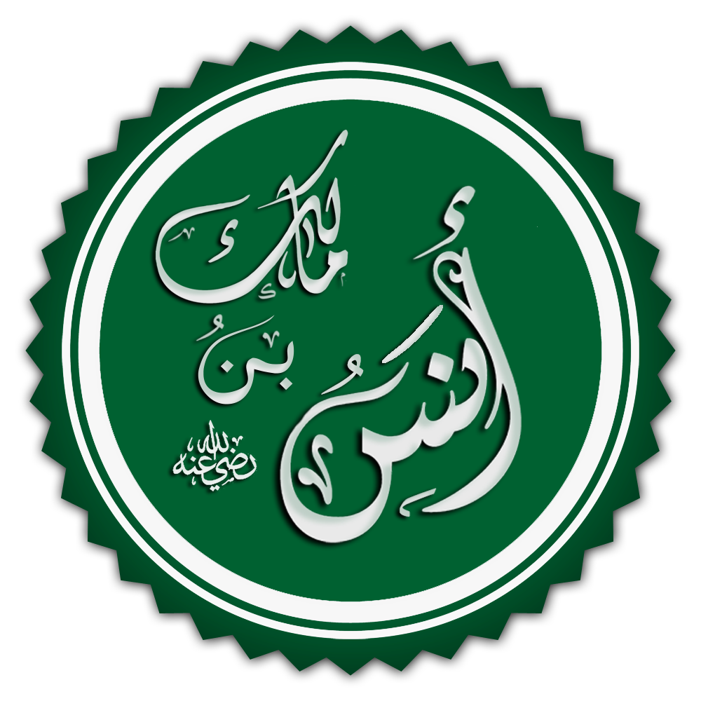 تخطيط اسم الصحابي أنس بن مالك ملحوق بدعاء الرضا عنه